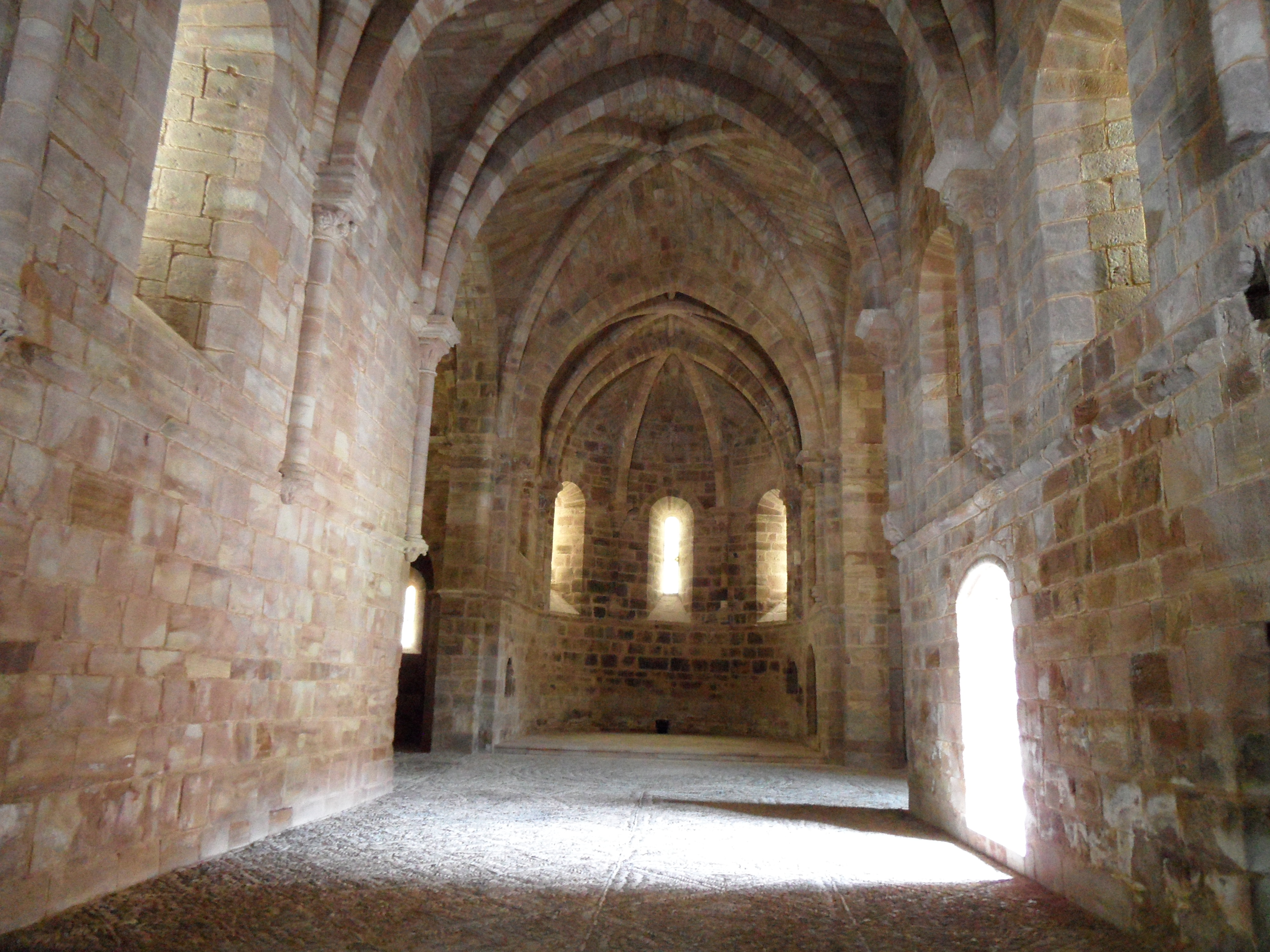 Monasterio Santa Maria de Bujedo de Juarros. Este Monasterio es de propiedad privada, y ha sido restaurado siendo galardonado por la Asociación Europa Nostra en el año 1981